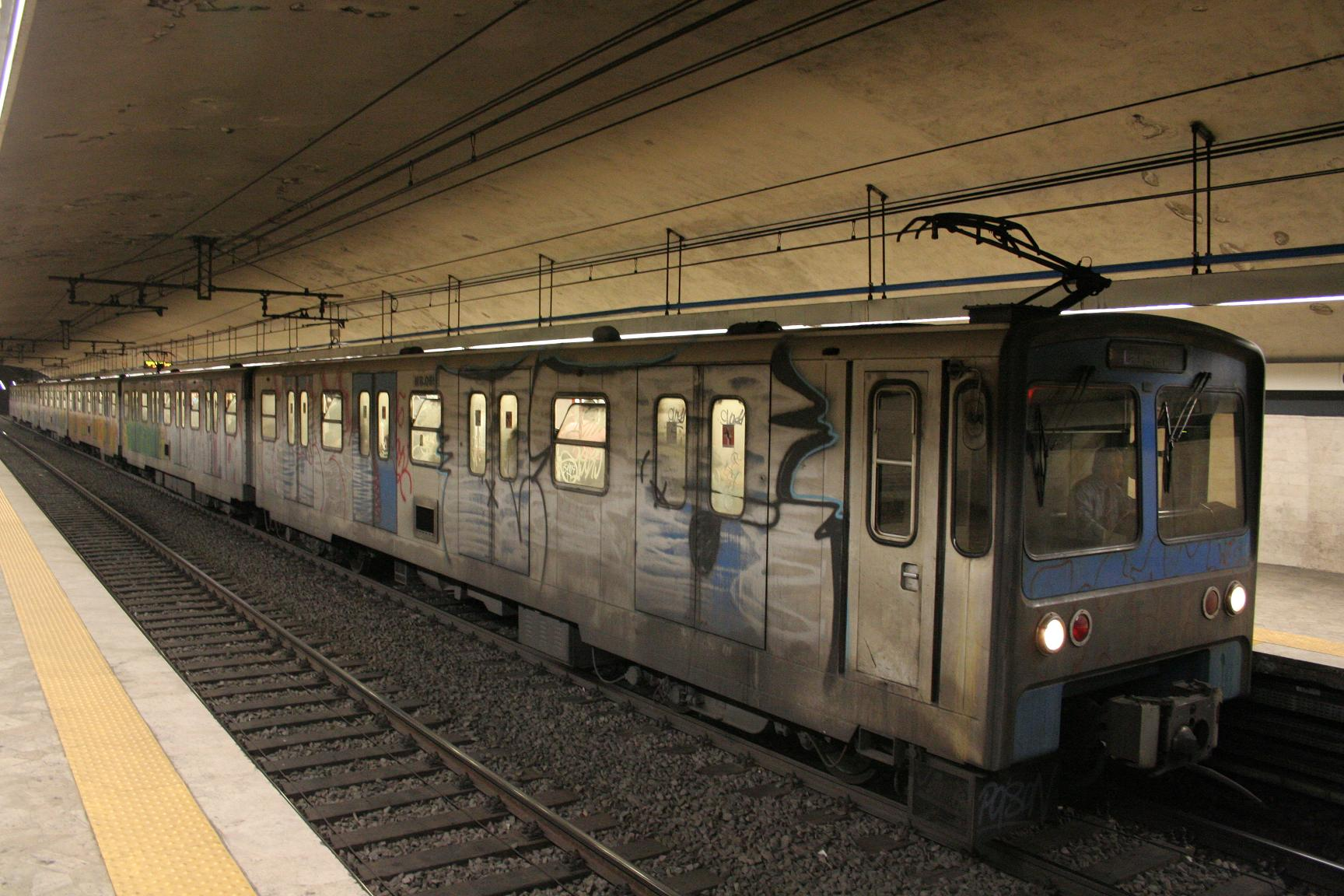 Metropolitana di Roma, stazione Colosseo